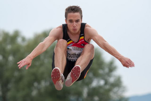 Mathias Broothaerts in actie tijdens de EK voor junioren in Rieti.